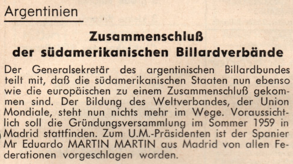 see file name